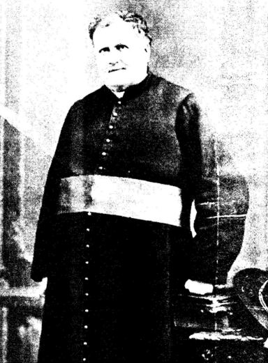 Une photo plain-pied du curé Labelle, colonisateur des Laurentides au nord de Montréal